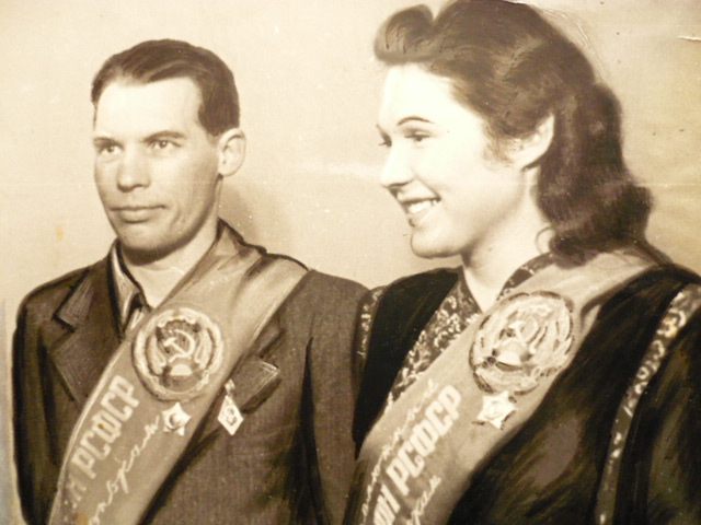 Советские конькобежцы Г.Пискунов и Л.Селихова